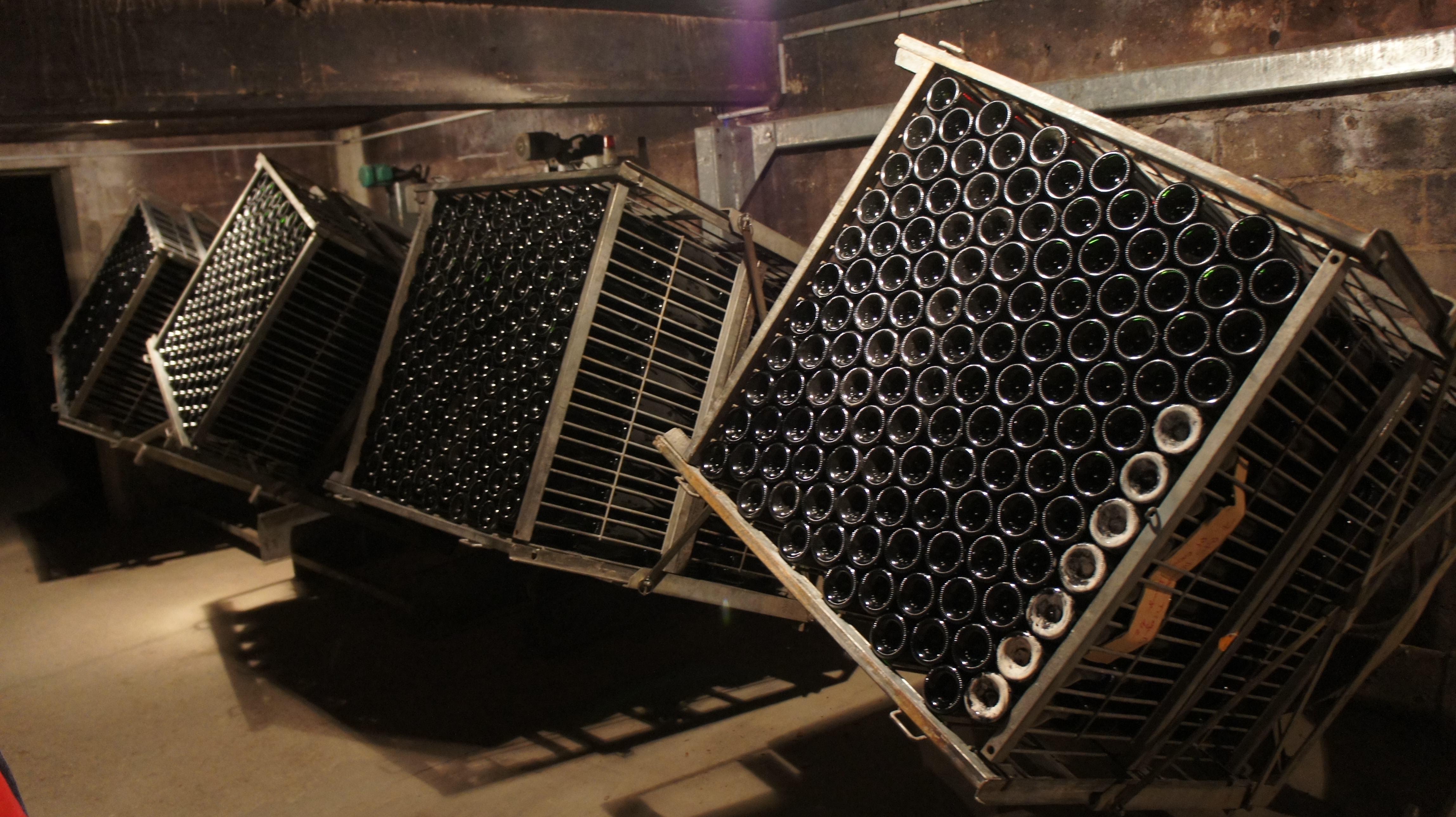 Un ensemble de gyropalette en action dans une cave de vigneron de champagne, Verzy.